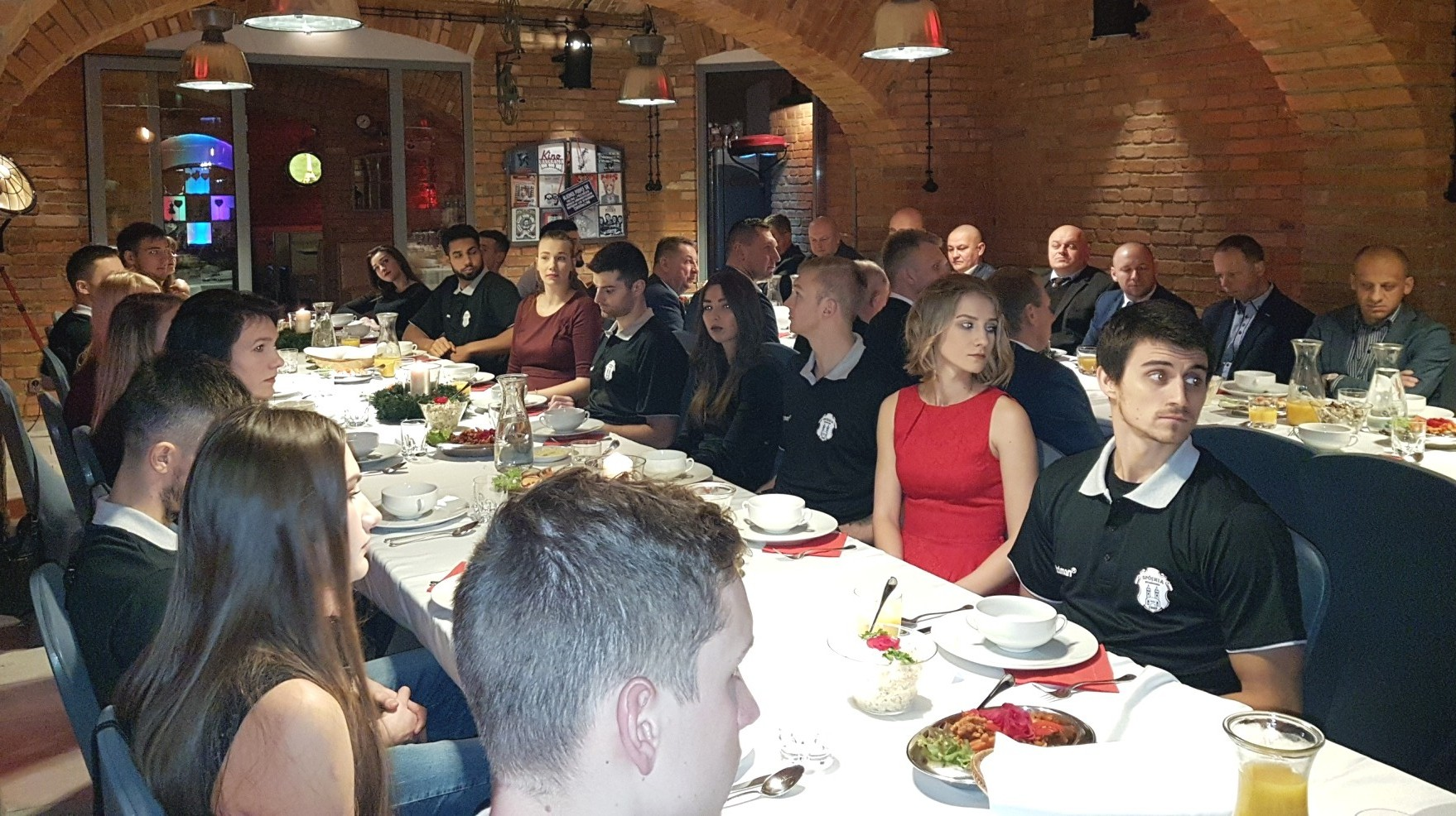 Wigilia w Spójni Stargard (20.12.2018)